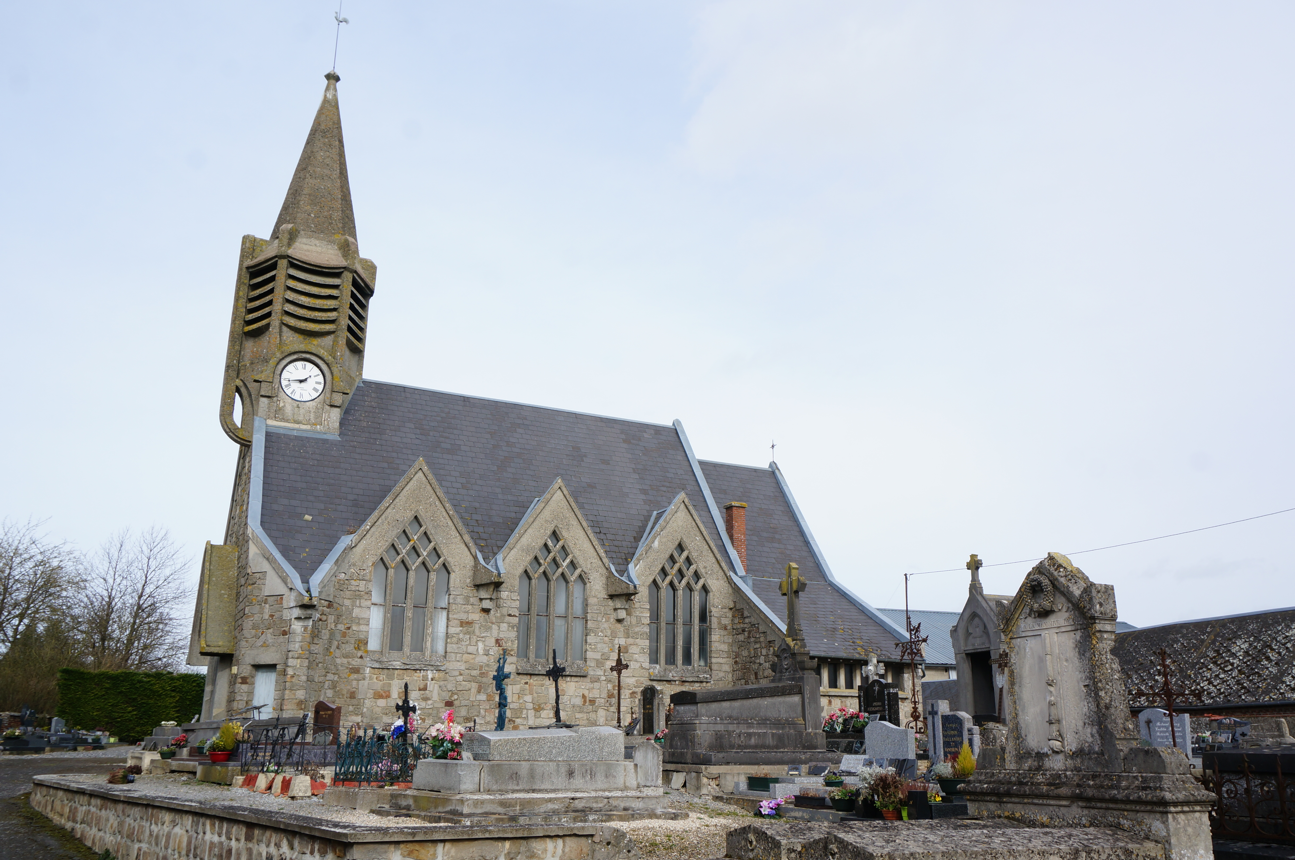 Vue de la commune de Pargny-les-Bois.